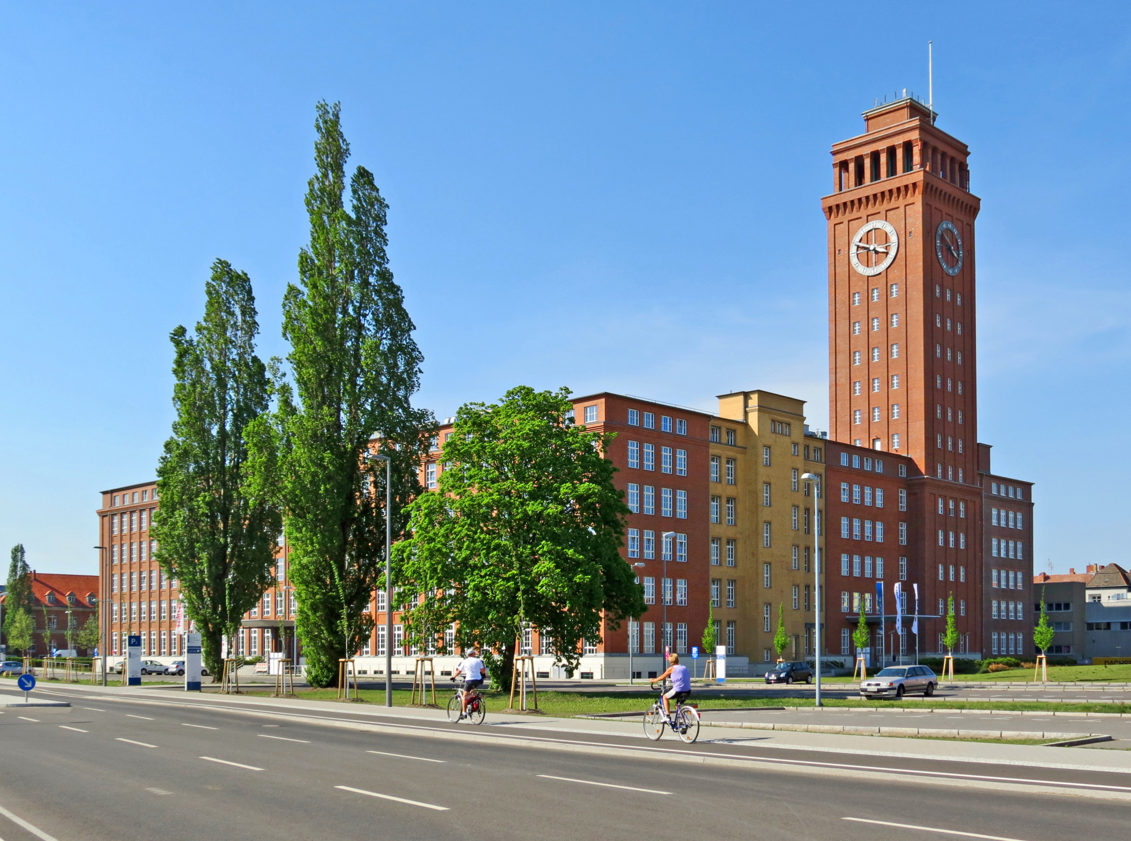 Siemensturm in Berlin-Siemensstadt